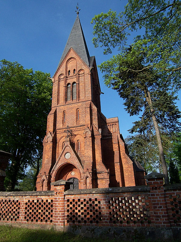 Kirche in Polchow, Landkreis Güstrow